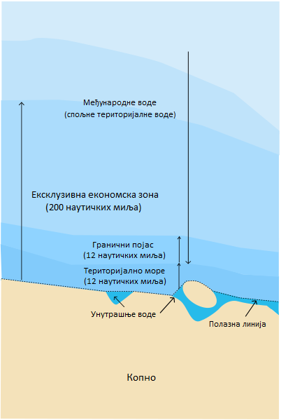 Илустрација морских појасева ексклузивне економске зоне према међународном праву